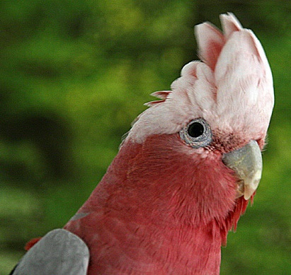 Rosakakadu Thomas Schultz